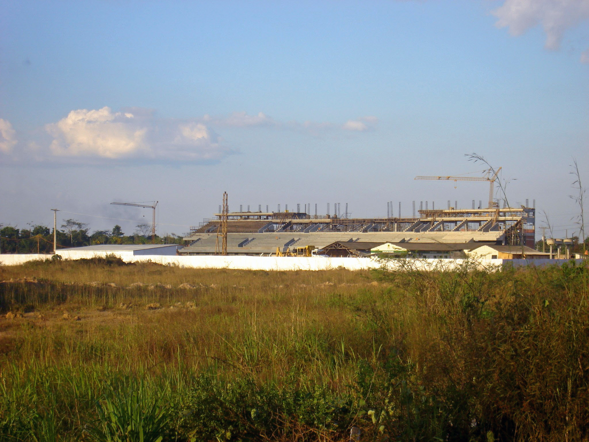 Arena da Floresta stadium under construction, Rio Branco, Acre, Brazil.